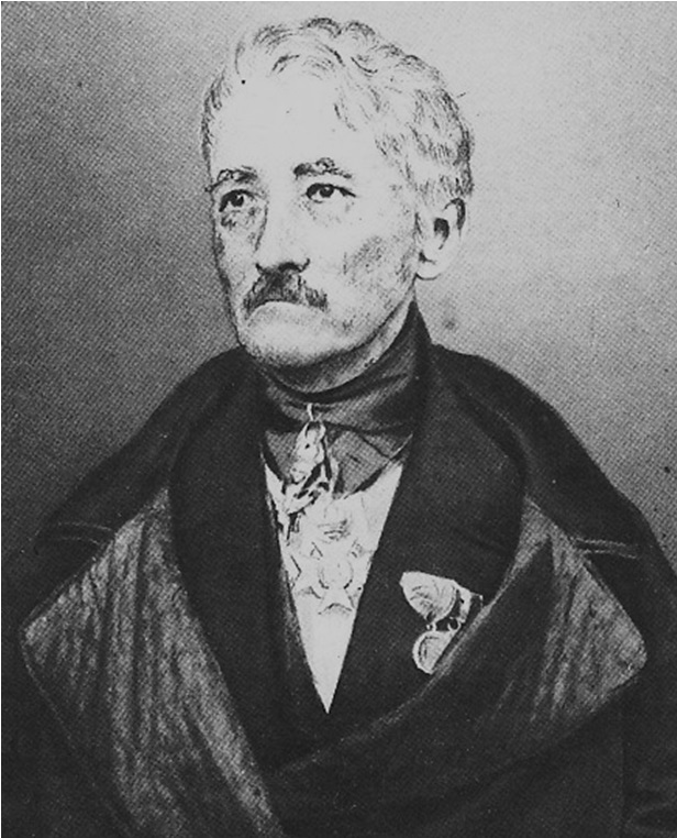 Dietrich Georg Kieser em uma fotografia de Carl Schenk no ano de 1858